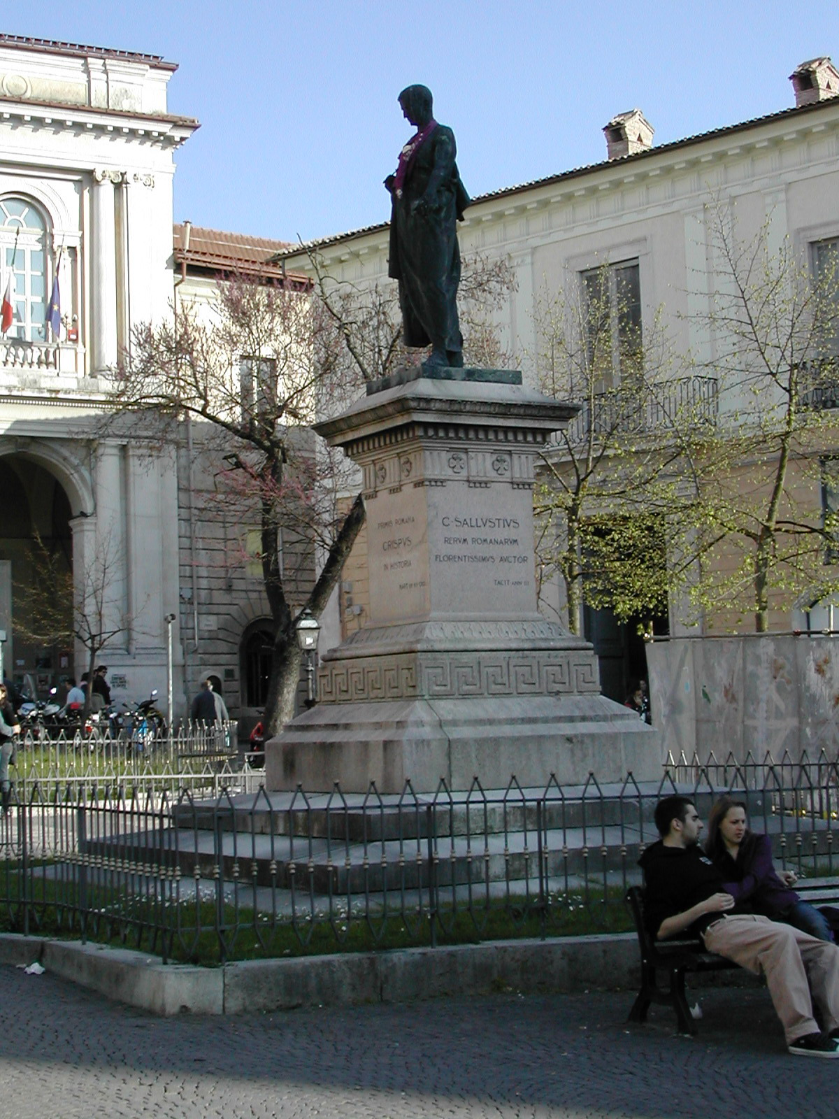 l'Aquila Piazza_Palazzo_Monumento_Gaio_Sallustio_Crispo